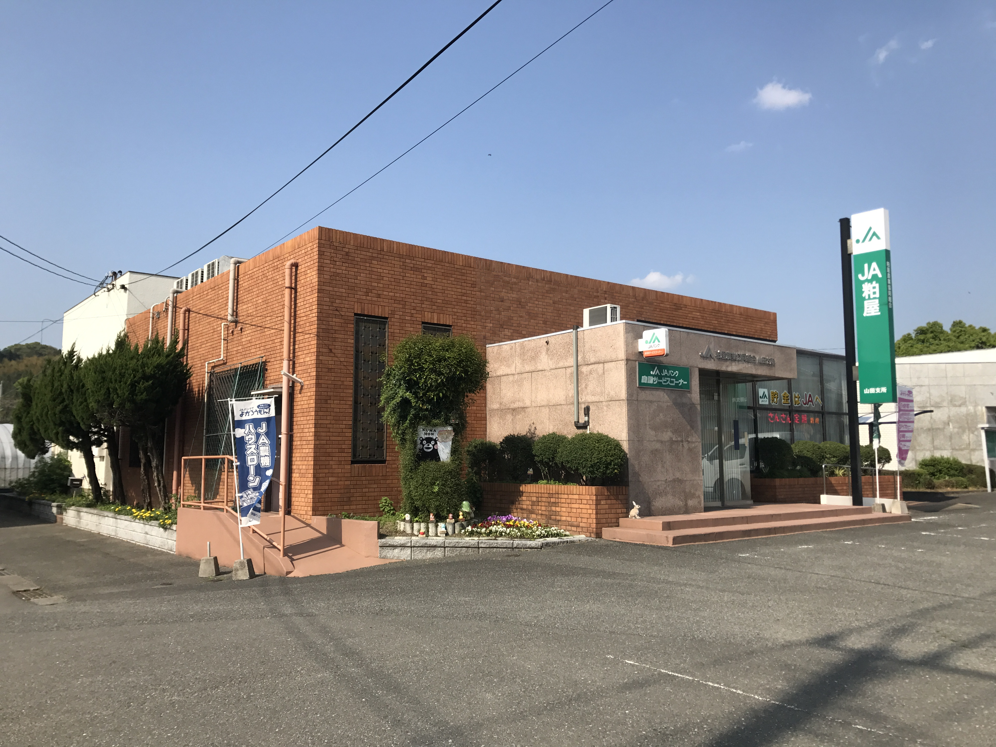 JA粕屋山田支所